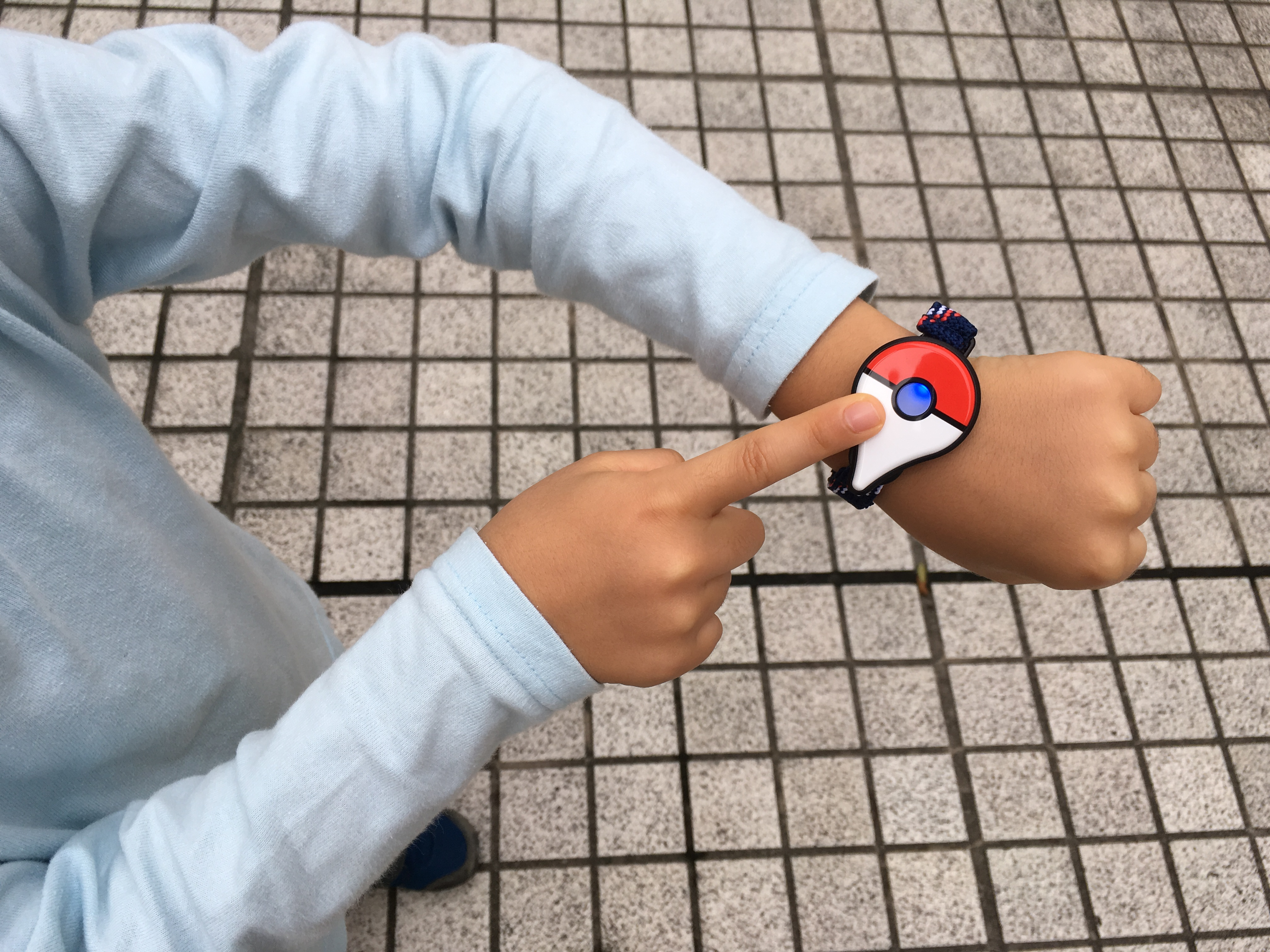 ポケモンGO Plus 来たよ